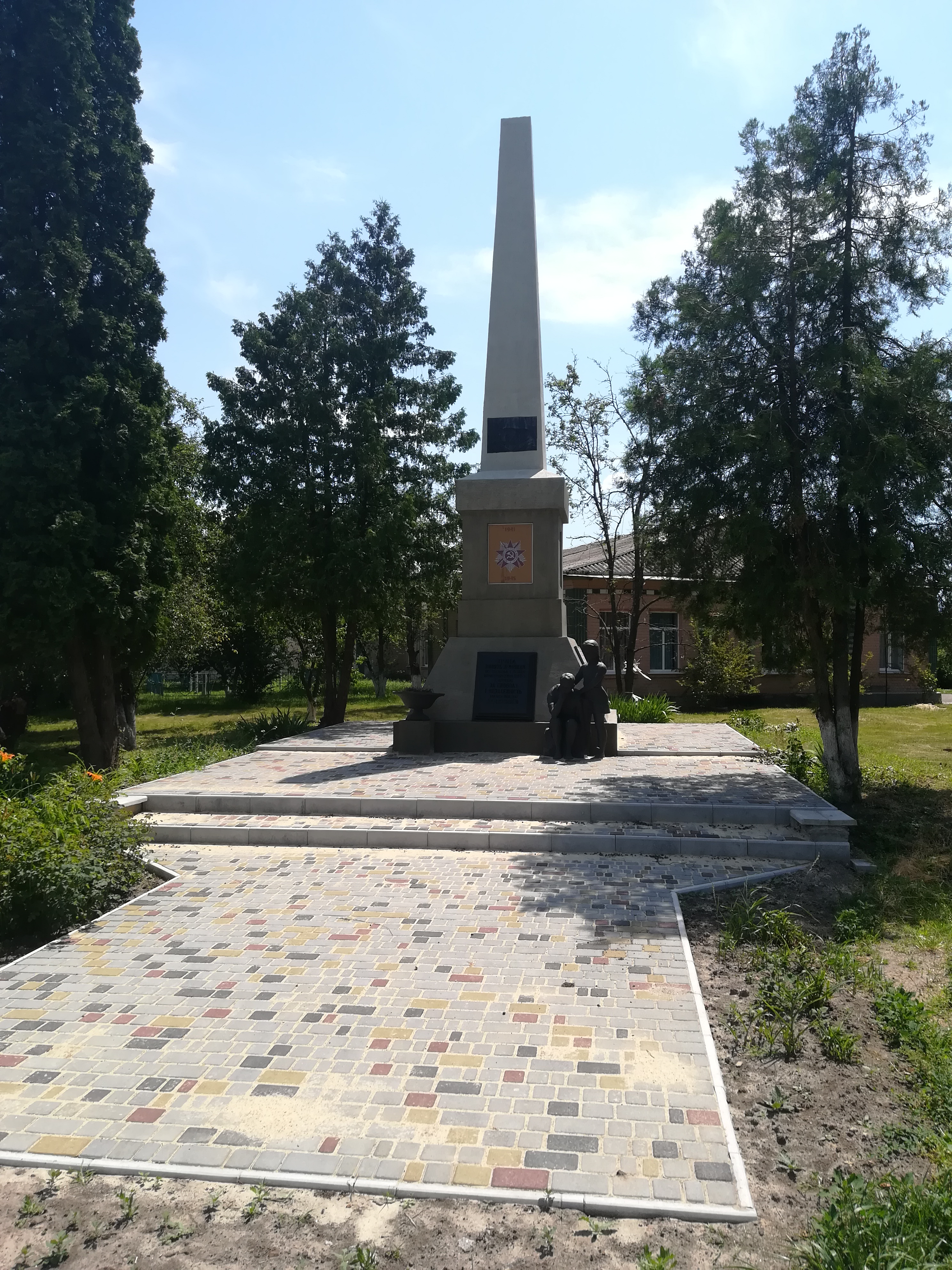 Пам'ятник героям ВВв